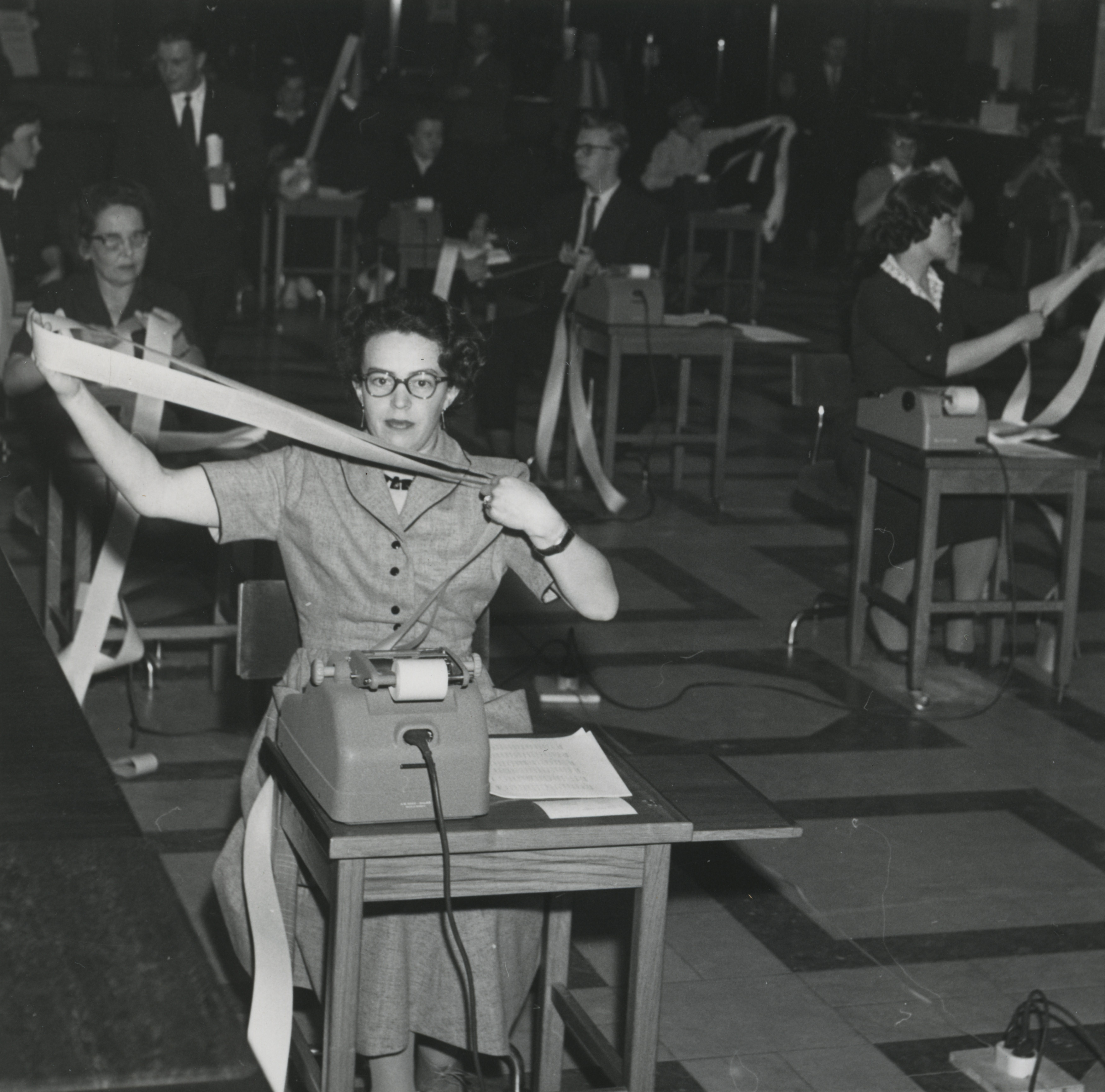 Kuva on Kansallispankissa järjestetystä konelaskukilapailusta 23.3.1957. Kuvaaja Oy Foto Ab.